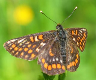 Euphydryas maturna, Finland, Hamina.